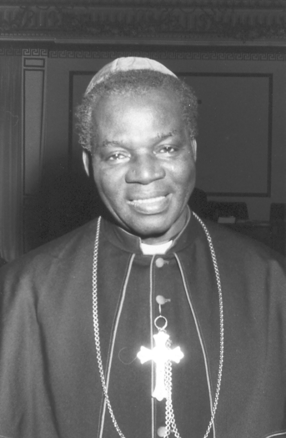 Il Dominic Ignatius Ekandem, vescovo di Ikot-Ekpene